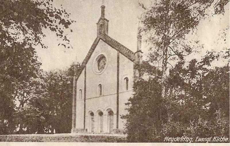 Verdainės evangelikų bažnyčia